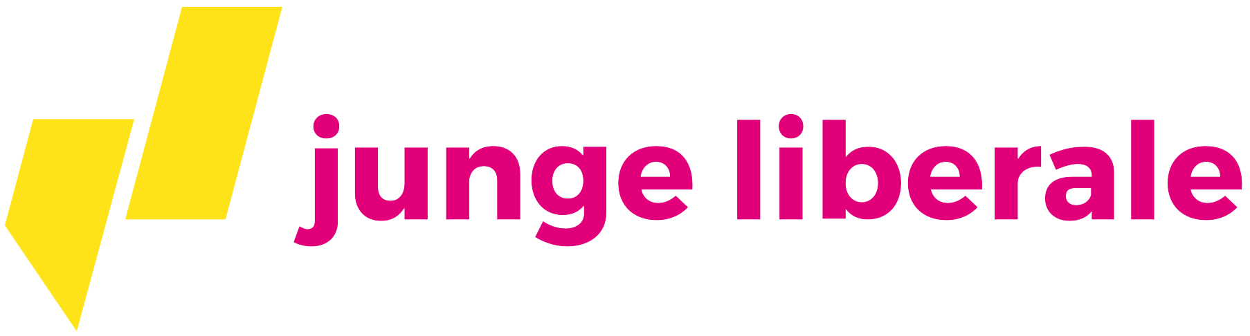 Logo der Jungen Liberalen